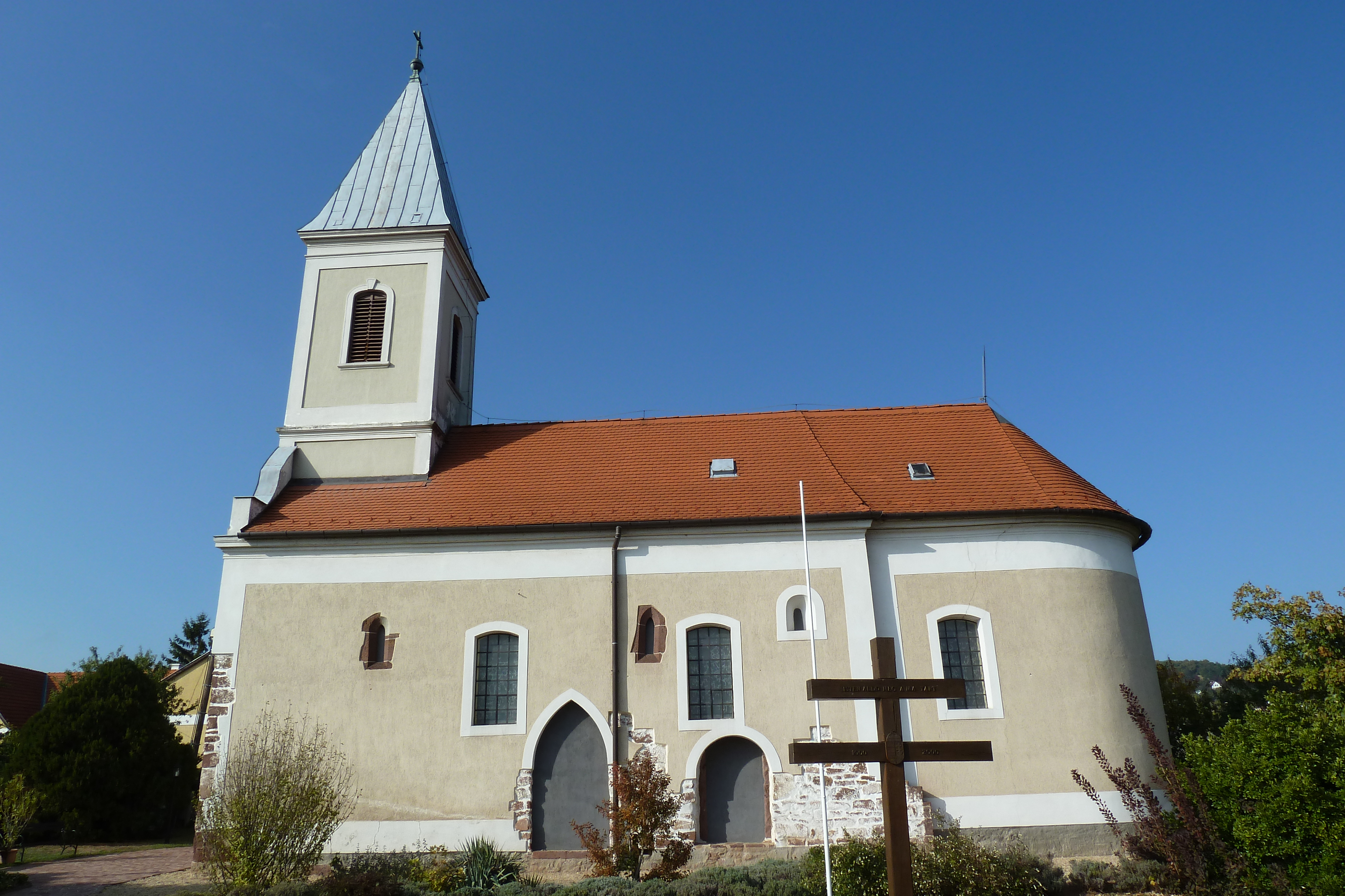 Szent István első vértanú római katolikus templom (Paloznak, Kossuth utca)